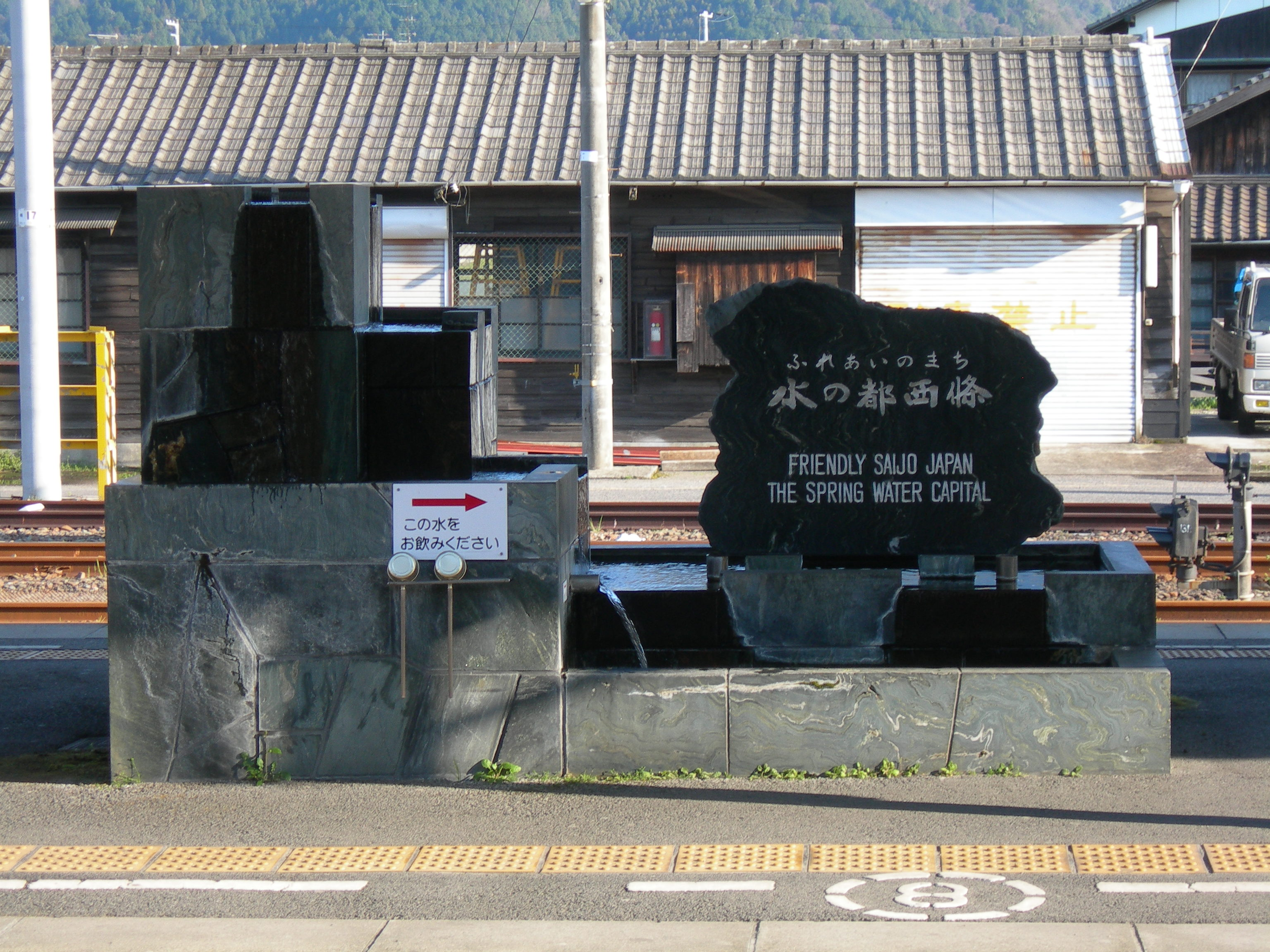 伊予西条駅プラットホームにある「うちぬき」